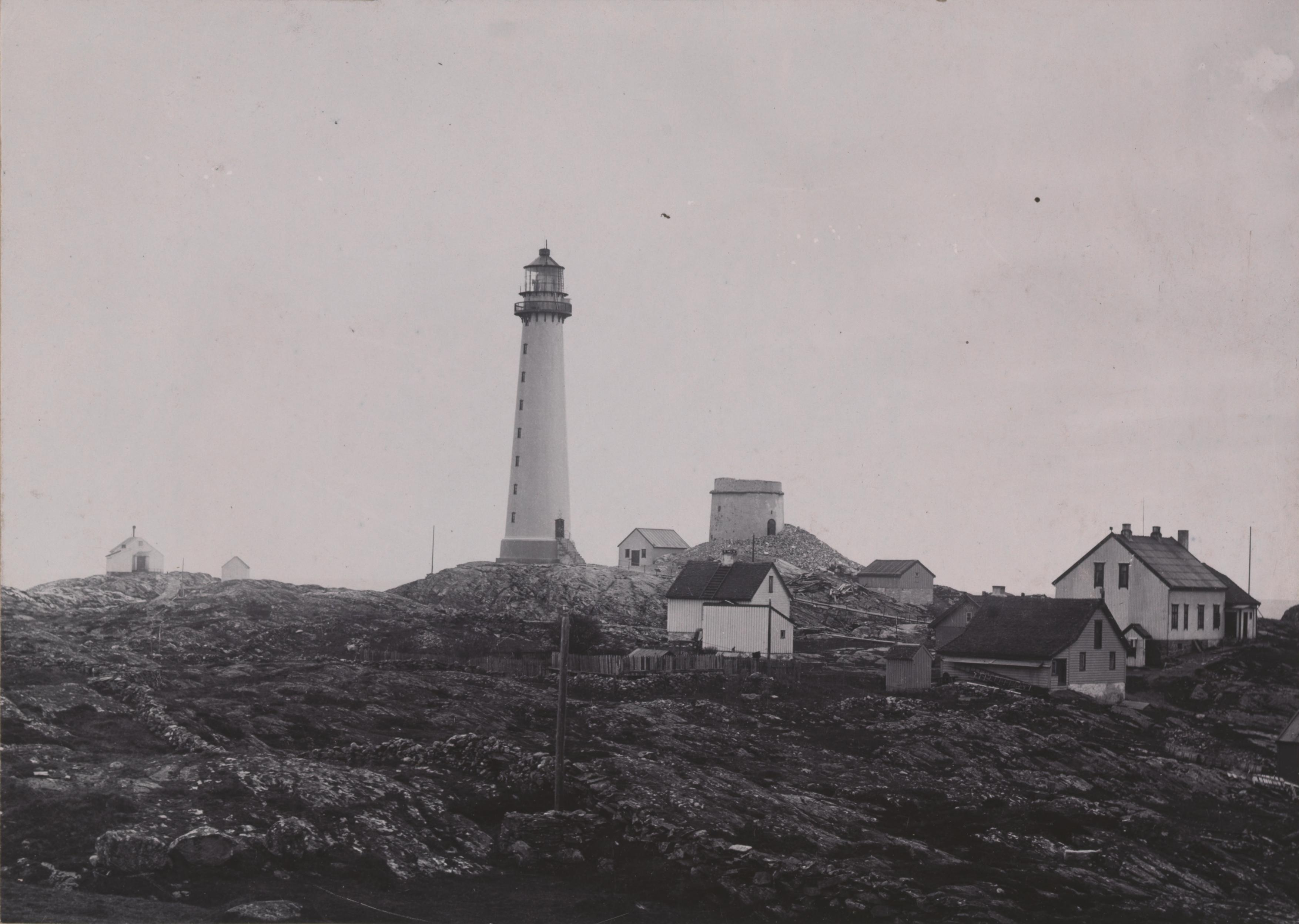 Bildet er hentet fra Nasjonalbibliotekets bildesamling. Anmerkninger til bildet var: Tittel hentet fra påskrift på komponentnr 1 Oksøy fyr, Kristiansand, Vest-Agder